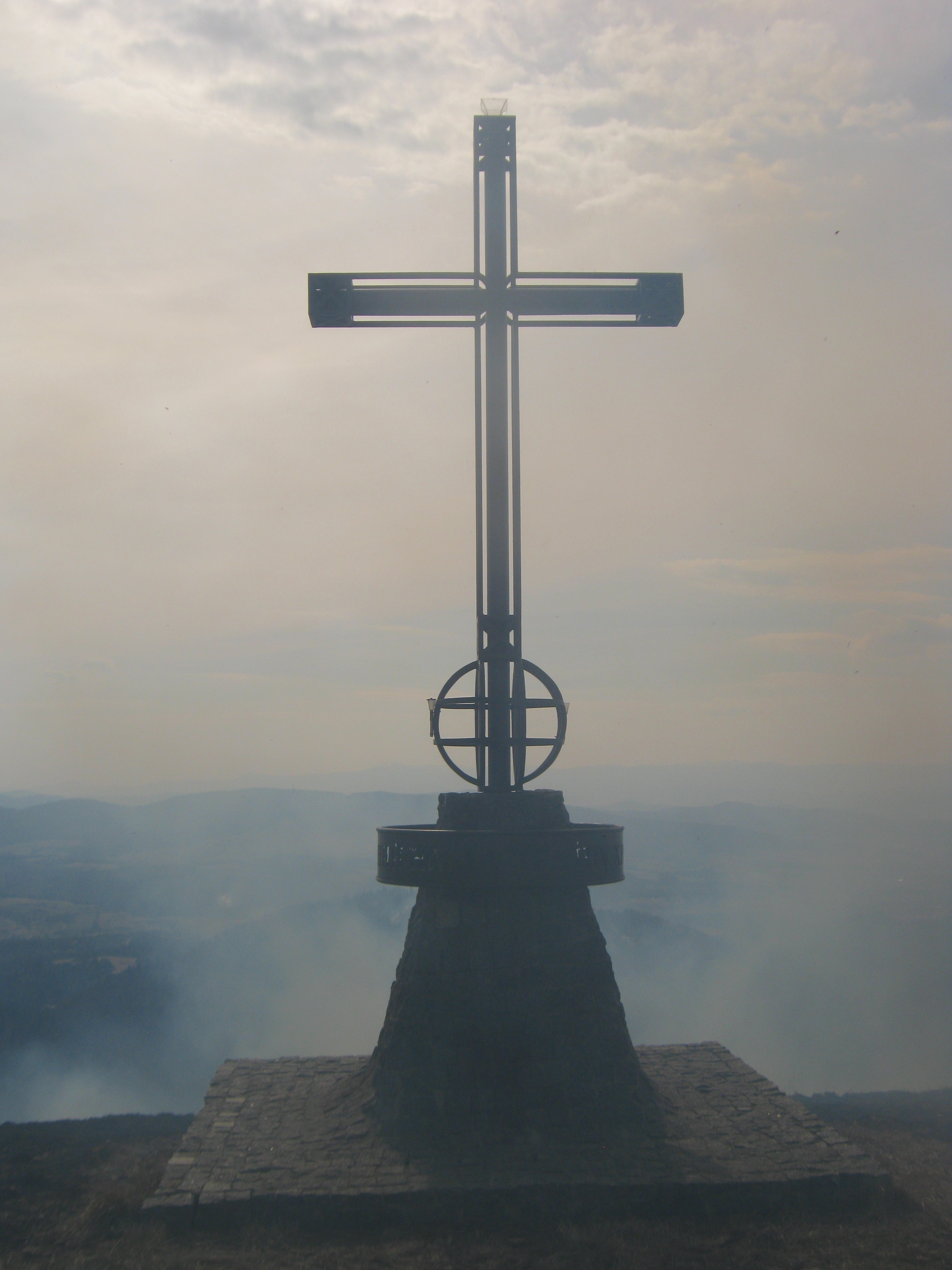 Хрест на вершині біля Церкви Св. Пророка Іллі